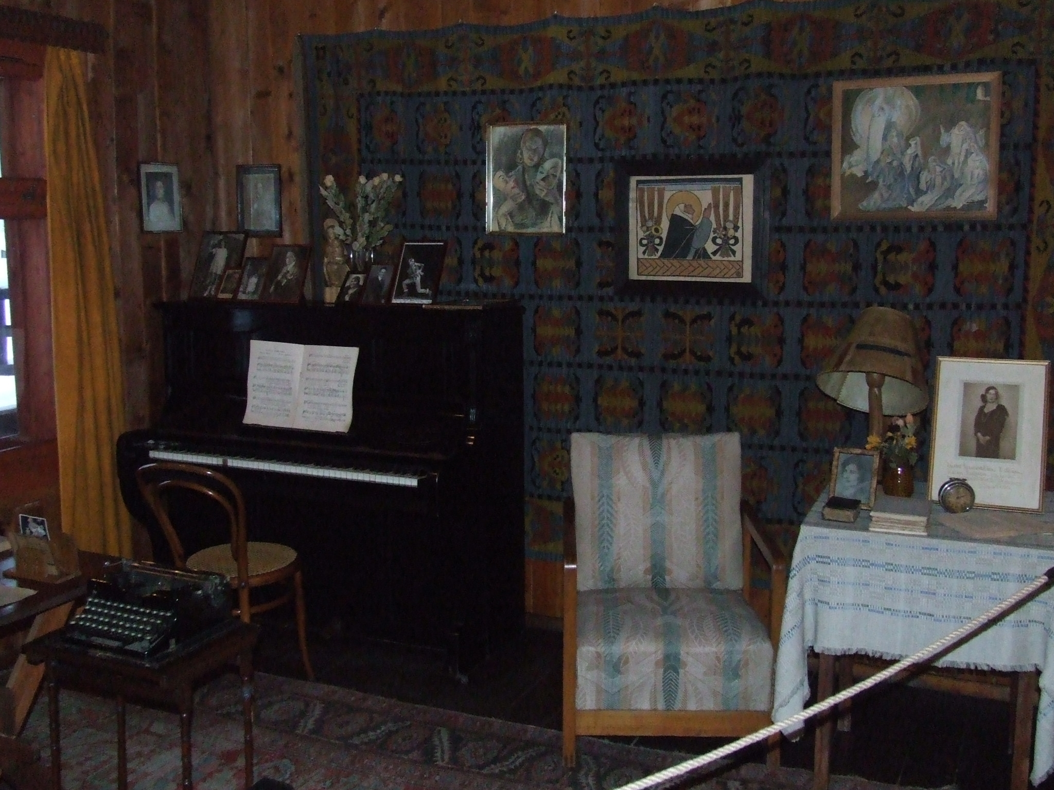 muzeum Atma Karola Szymanowskiego